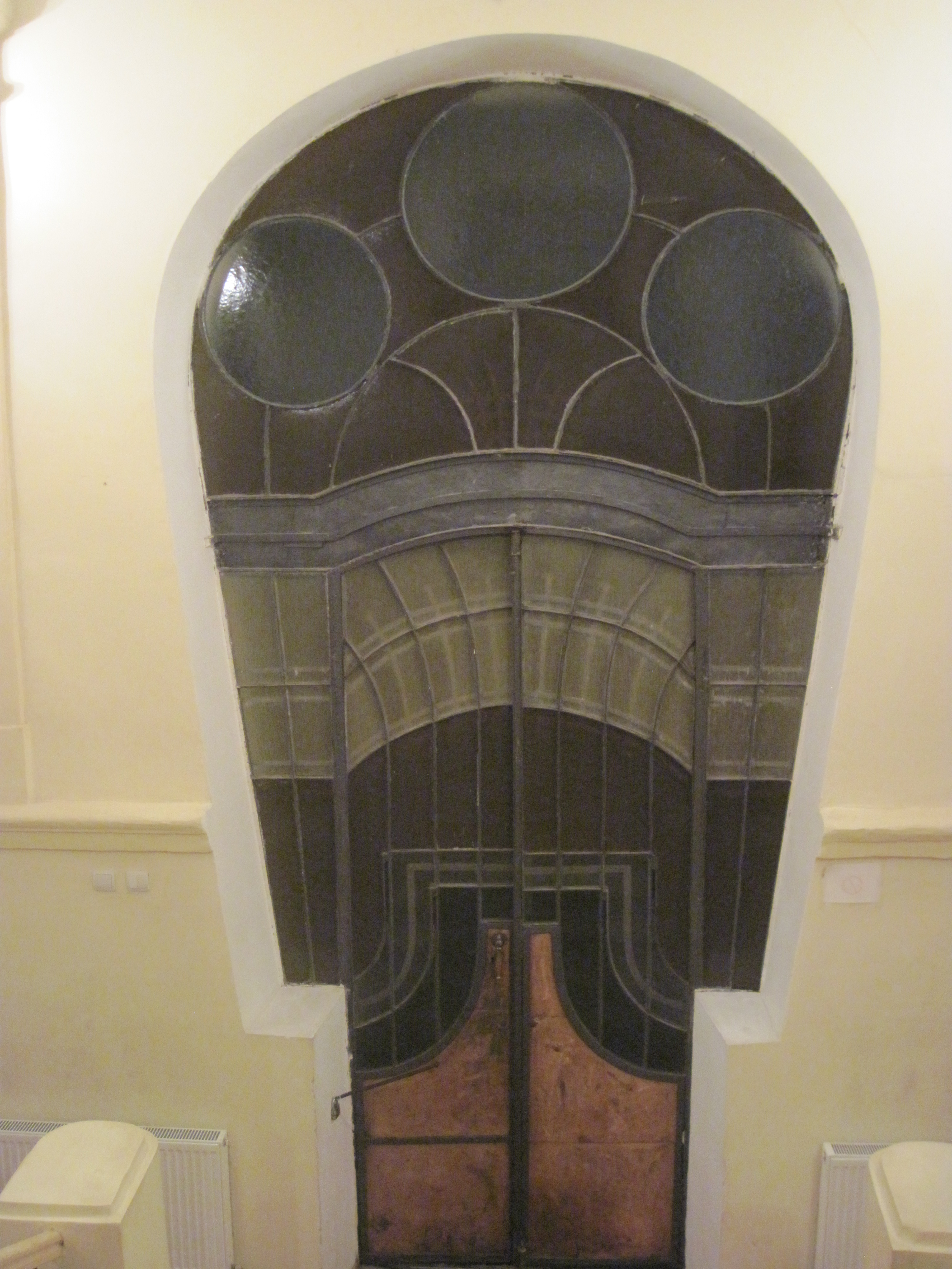 Вітраж вхідних дверей, 2014